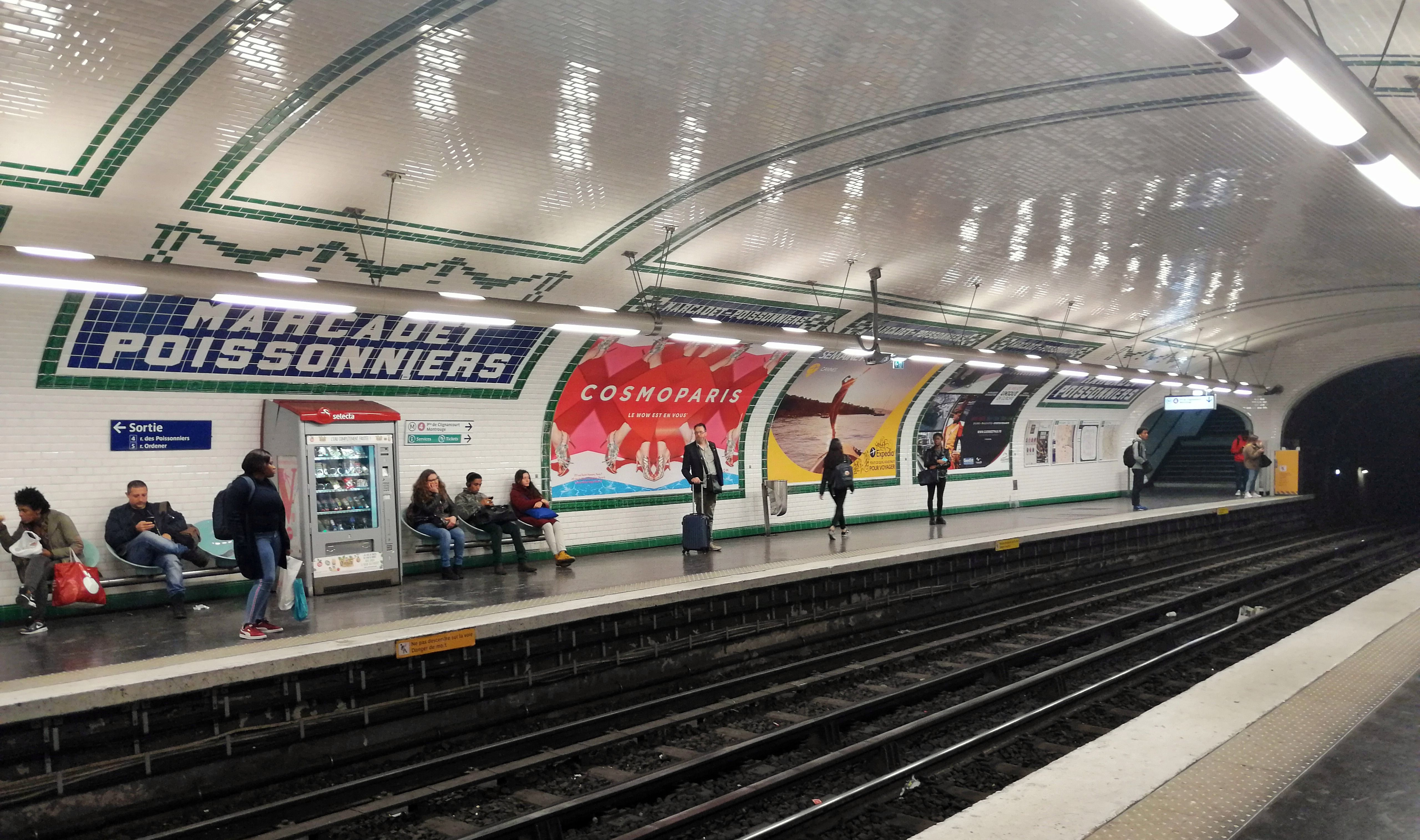 La estación de la línea 12 de Marcadet - Poissonniers en 2019